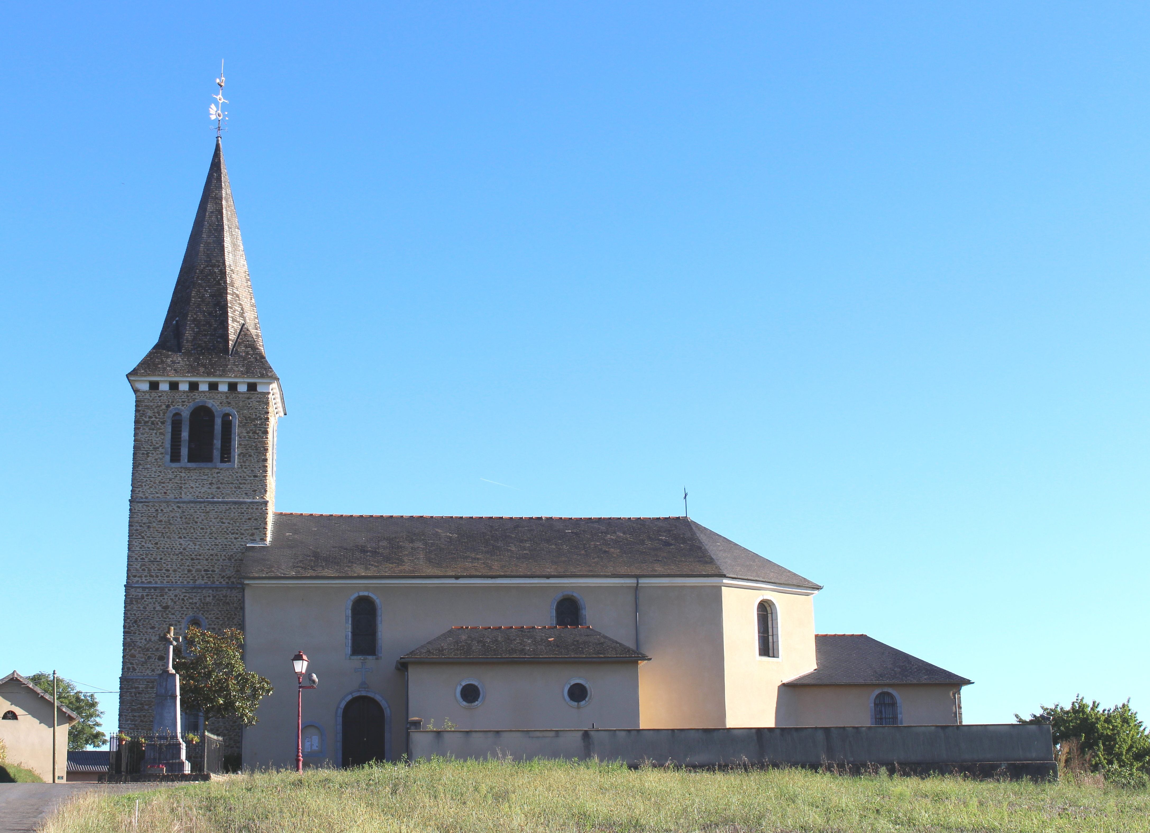 Église Sainte-Foi de Laslades (Hautes-Pyrénées)